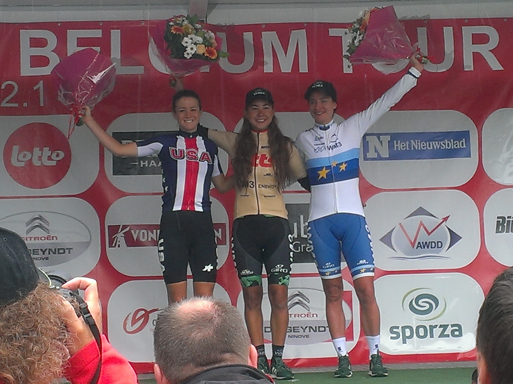 Huldiging van de winnaars van de Lotto Belgium Tour 2017 in Geraardsbergen. Podium algemeen klassement: 1. Anouska Koster 2. Ruth Winder 3. Marianne Vos